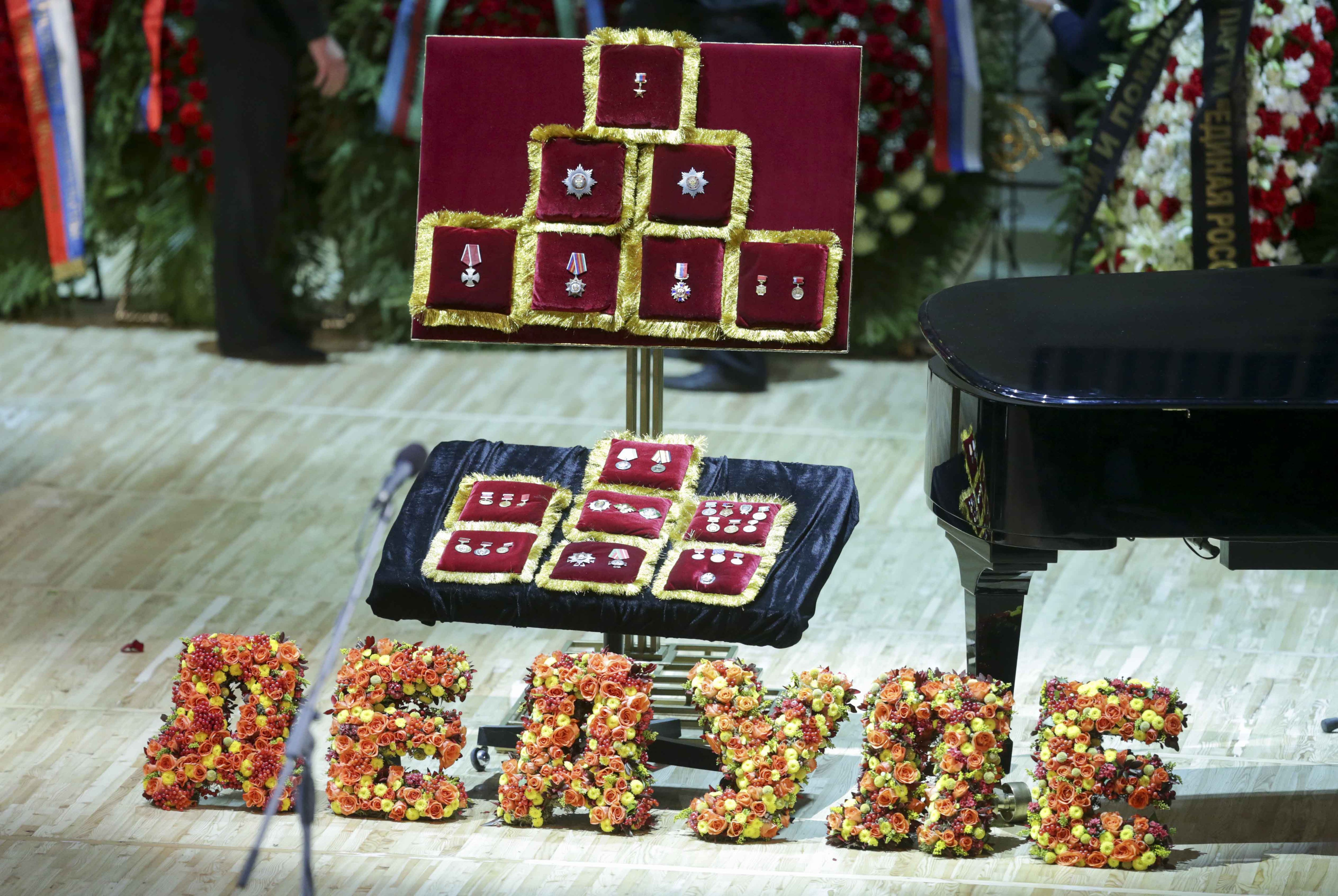 Церемония прощания с Иосифом Давыдовичем Кобзоном